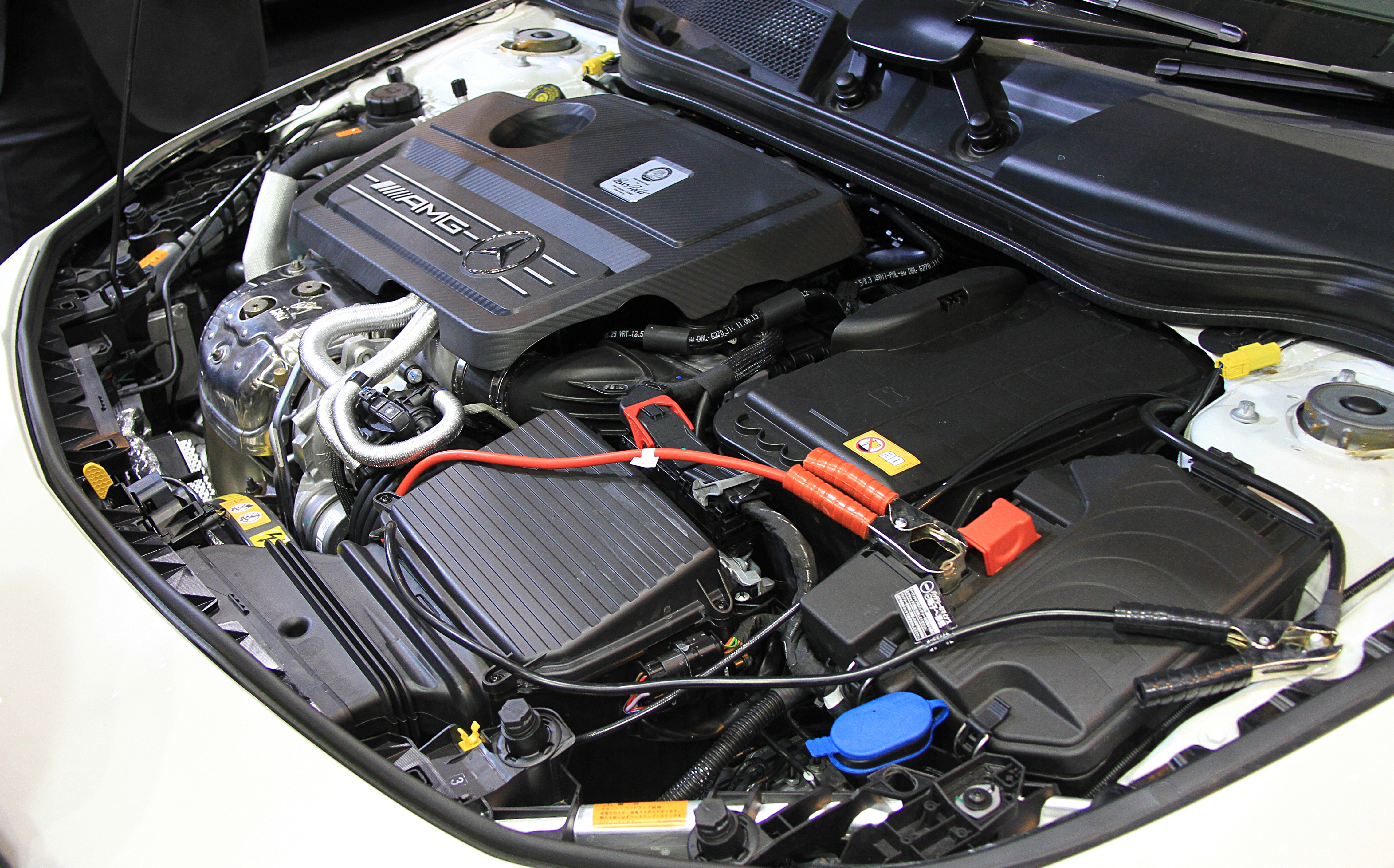 CBA-176052